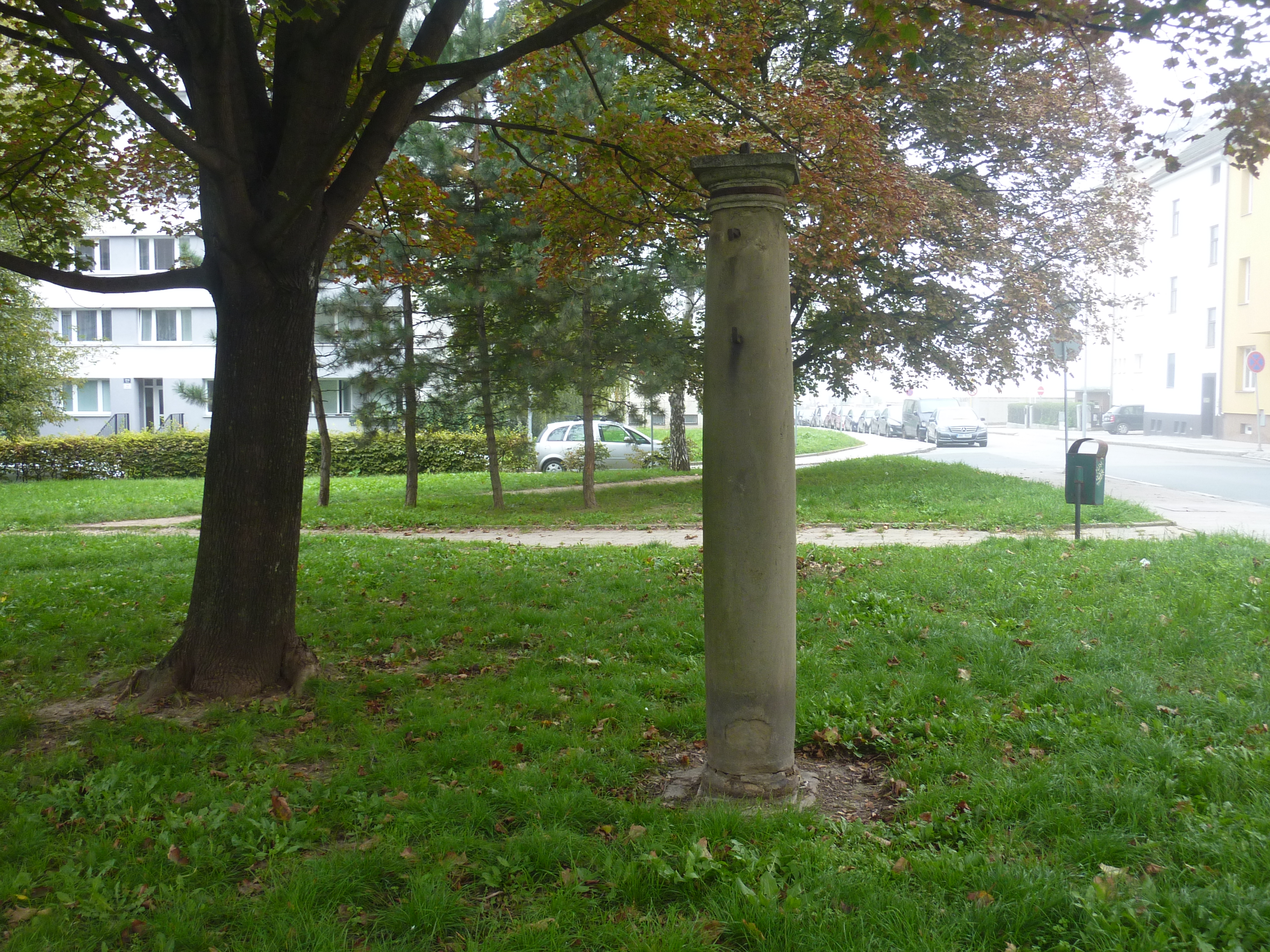 Sloup, na kterém stávala socha Panny Marie. Brno-Štýřice, v parčíku ve výseči ulic Vídeňská a Vojtova.